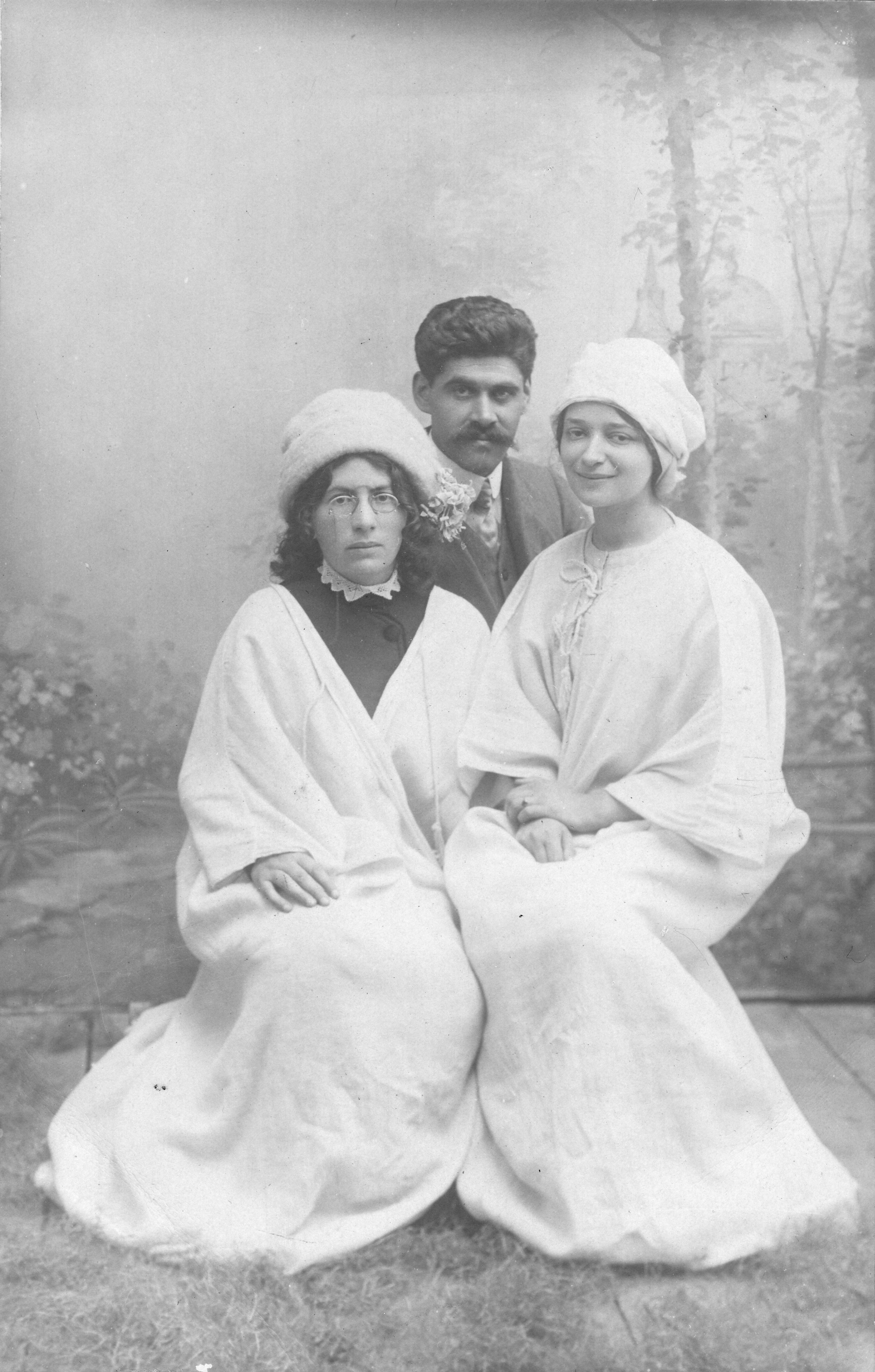 שולמית קלוגאי עם רחל ינאית ושמואל קאופמן